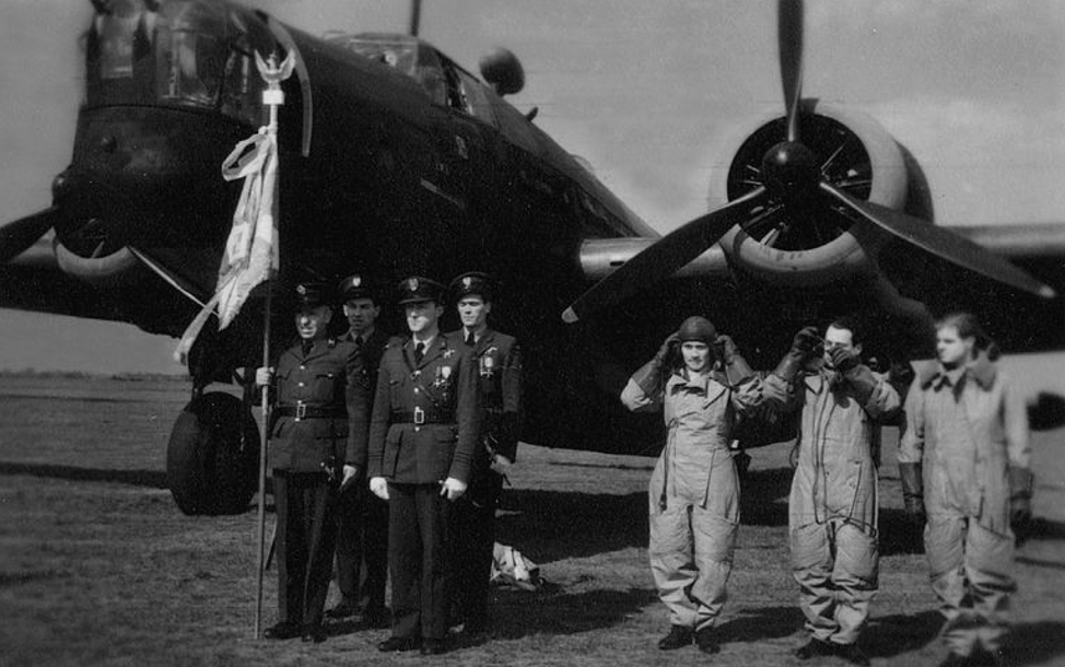 Poczet Sztandaru PSP po przekazaniu przez Dywizjon 303 Dywizjonowi 304 na lotnisku RAF Norfolk dnia 29 marca 1942 roku.W poczcie: por. pil. Jerzy Iszkowski, chor. adm. Kazimierz Szlachetka, sierż. pil. Stanisław Ziółkowski, sierż. mech. Karol Dubiel.